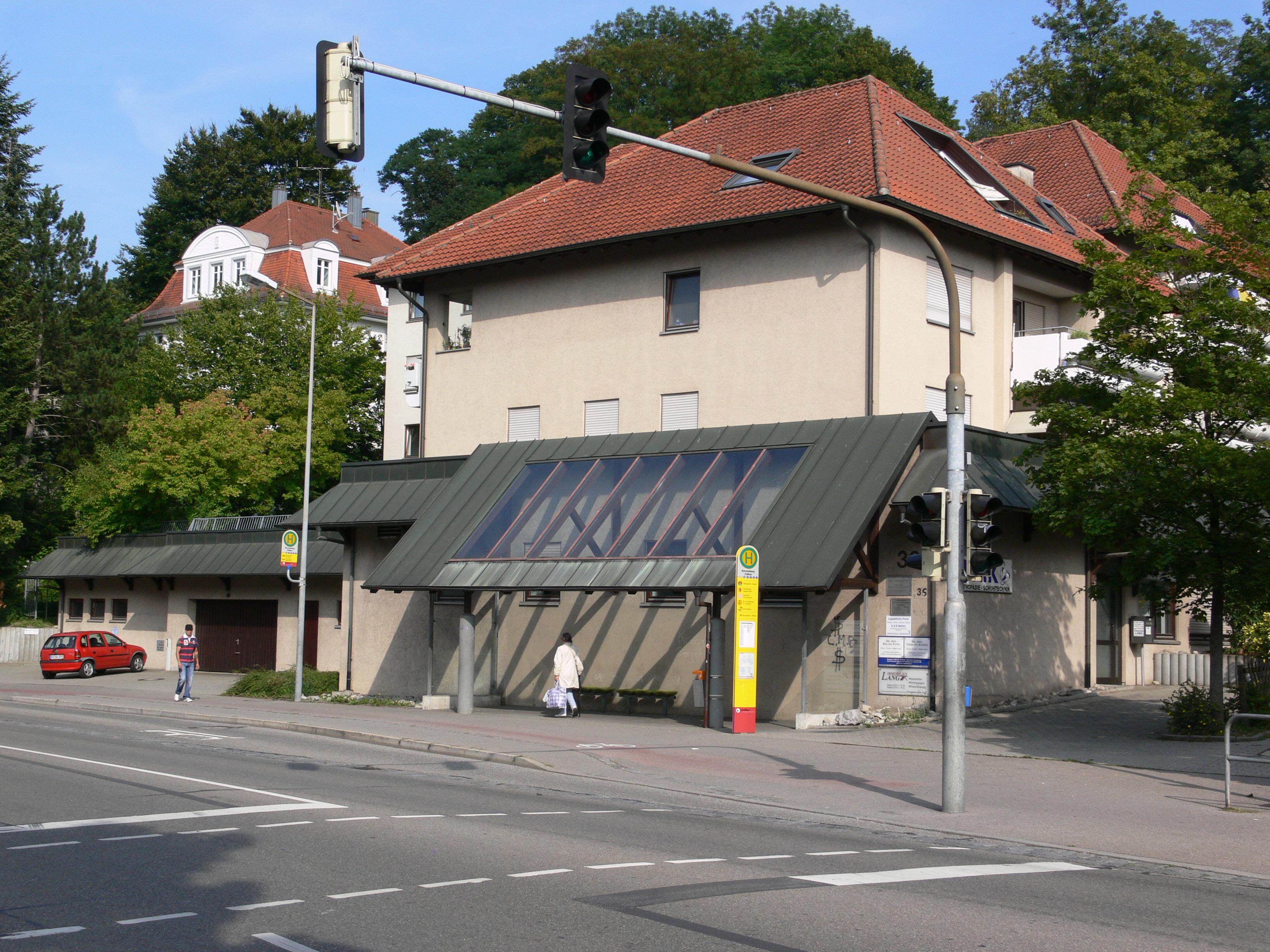 Ravensburg, Bushaltestelle "Falken" an der Gartenstraße, nördliche Seite